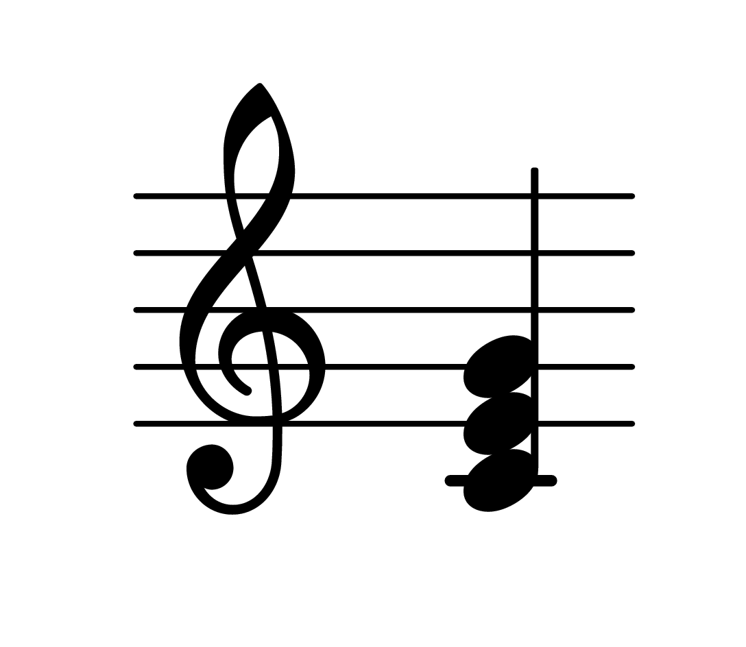 C-Dur Akkord Grundstellung c' - e' - g'